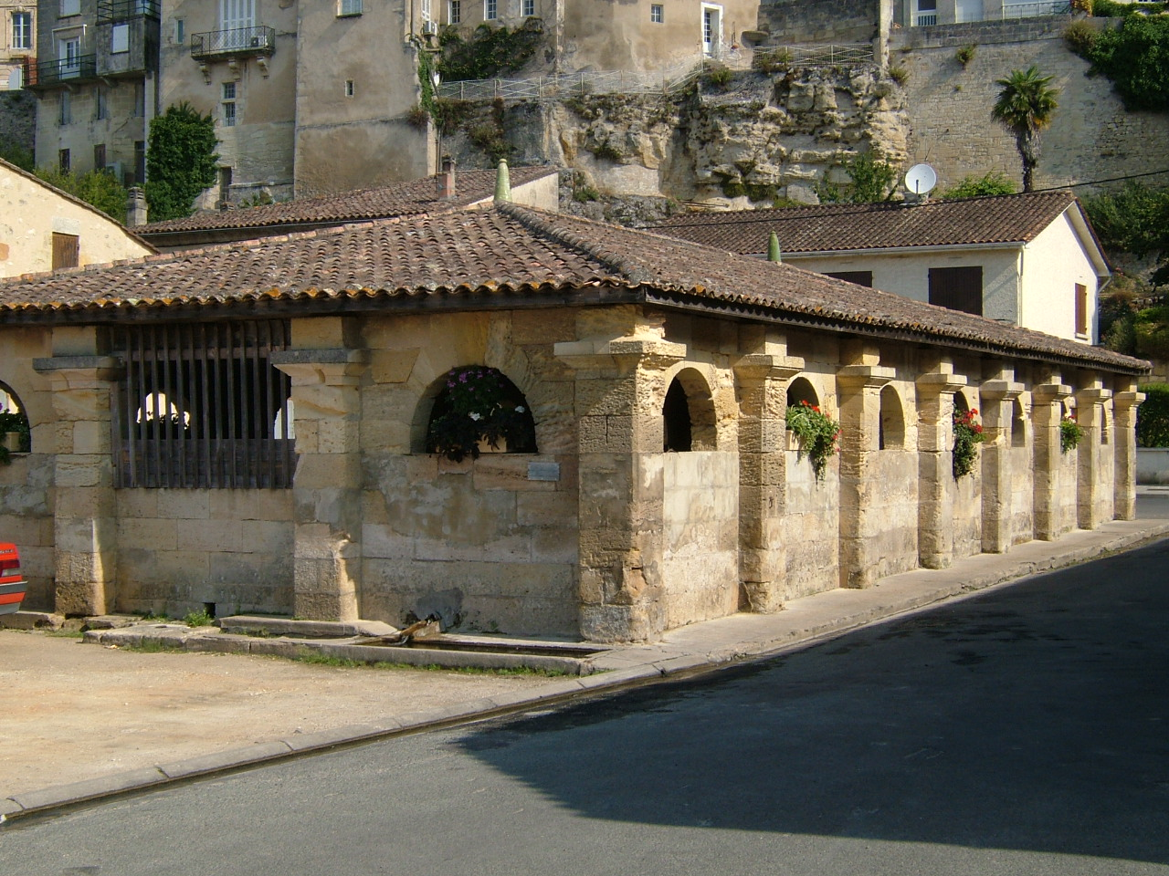 Lavoir, port de Bourg, Gironde.